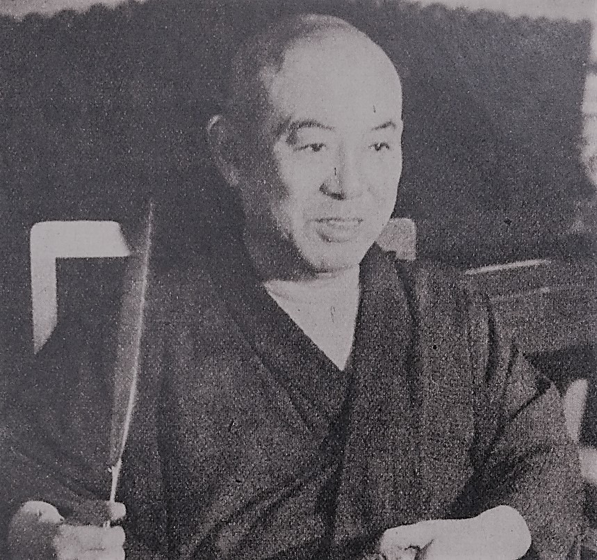 谷崎潤一郎